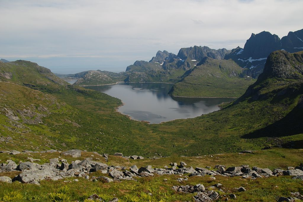 Solbjørnvatnet lake on Moskenesøya island in Lofoten, Norway